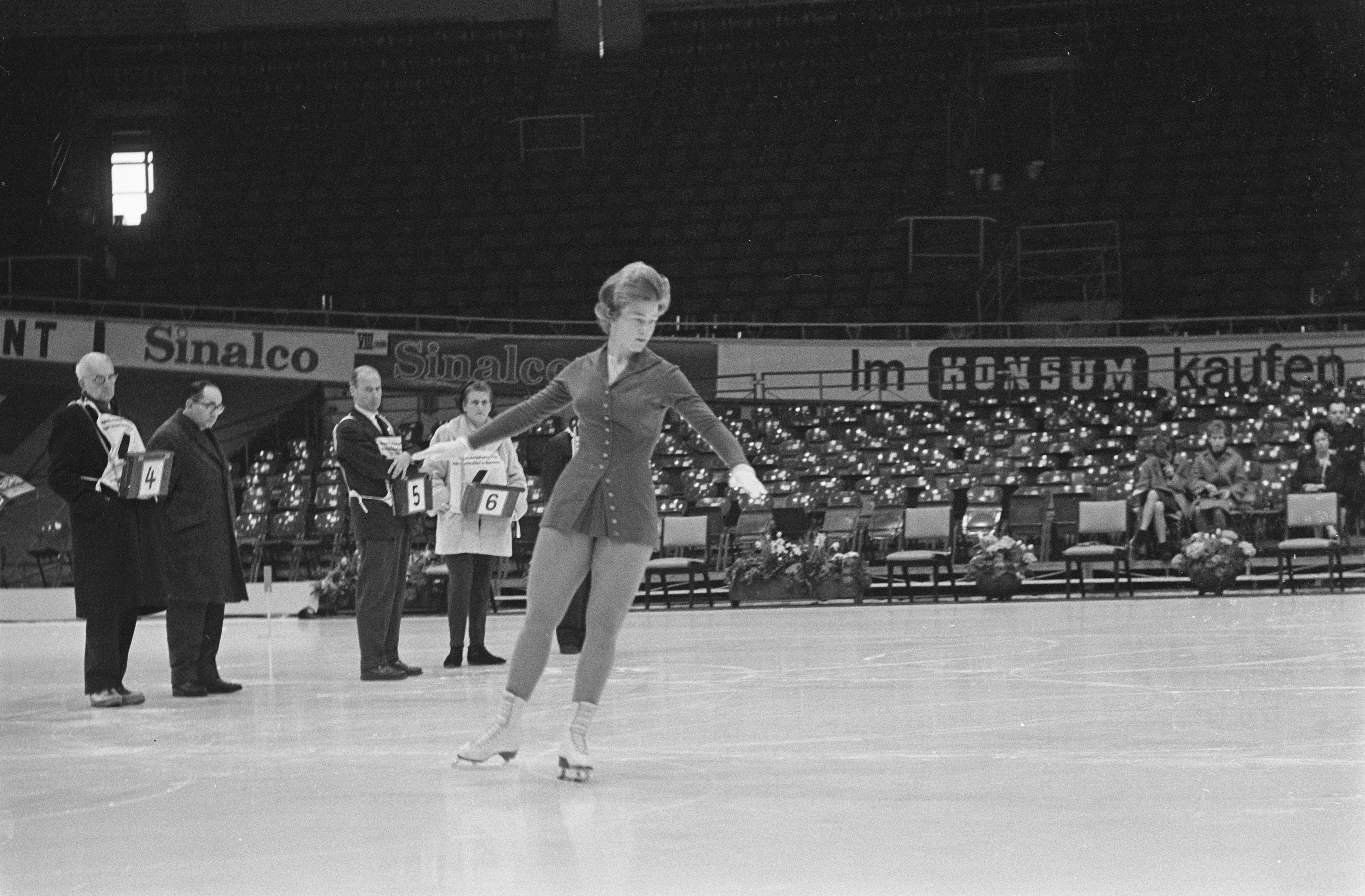 Collectie / Archief : Fotocollectie Anefo Reportage / Serie : Wereldkampioenschap kunstschaatsen 1964 te Dortmund Beschrijving : Sjoukje Dijkstra tijdens de verplichte figuren Datum : 29 februari 1964 Locatie : Dortmund Trefwoorden : kunstschaatsen Persoonsnaam : Dijkstra, Sjoukje Fotograaf : Pot, Harry / Anefo Auteursrechthebbende : Nationaal Archief Materiaalsoort : Negatief (zwart/wit) Nummer archiefinventaris : bekijk toegang 2.24.01.05 Bestanddeelnummer : 916-1189